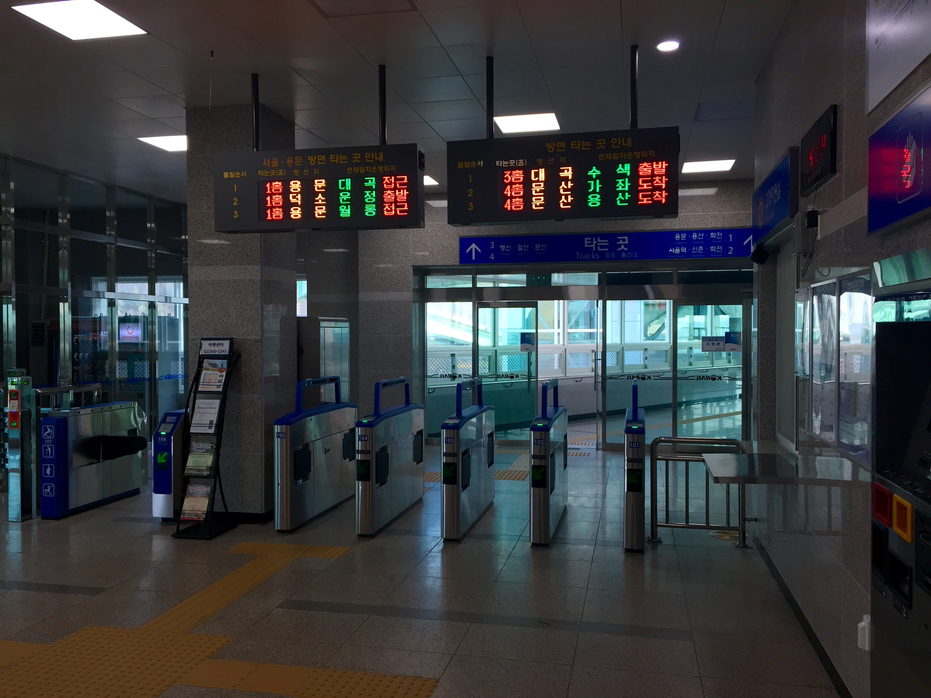 경의선 강매역 개찰구